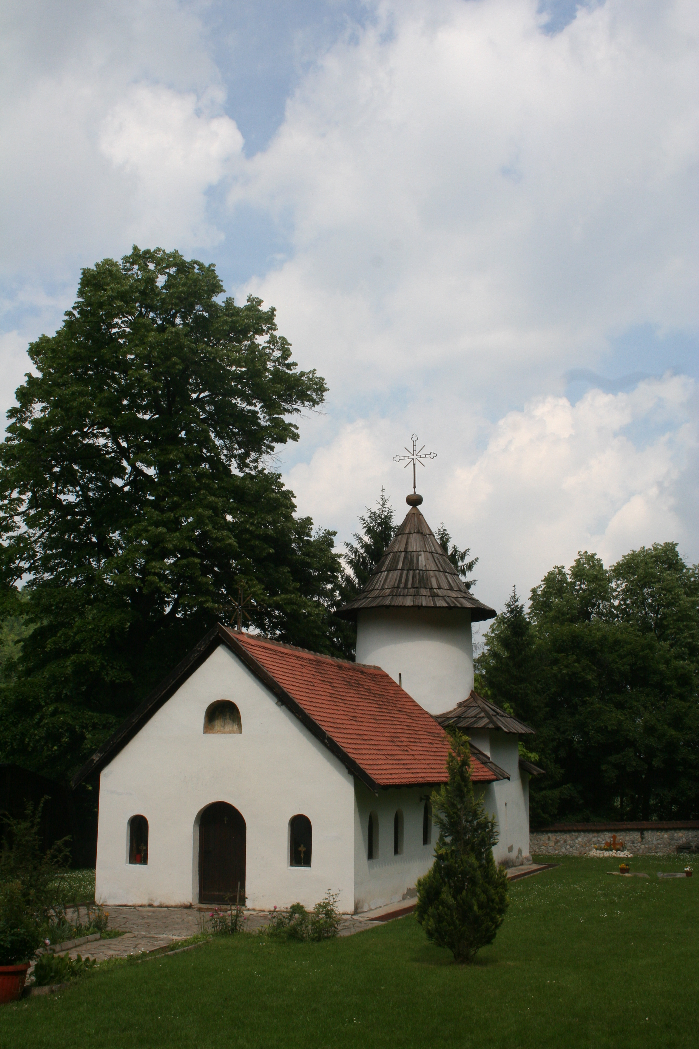 Manastir Jovanja